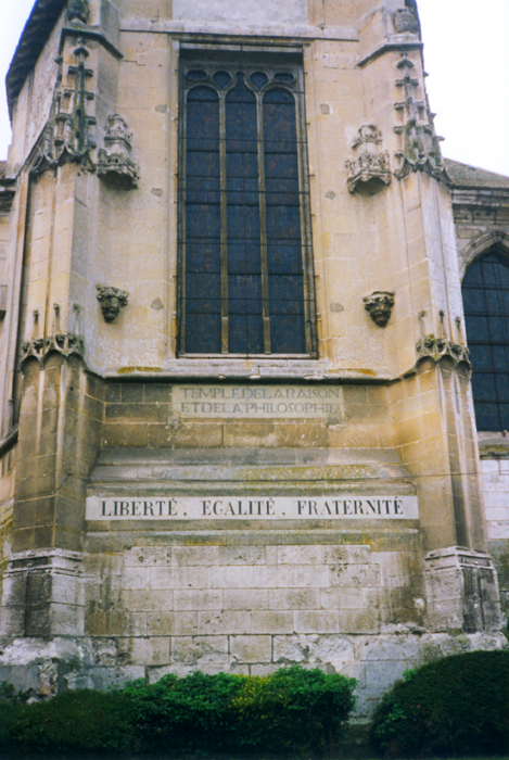 Inscription républicaine: Temple de la raison et de la philosophie Liberté, égalité, fraternité